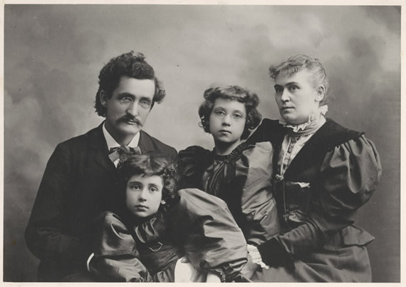 Liberty Hyde Bailey mit seiner Famile